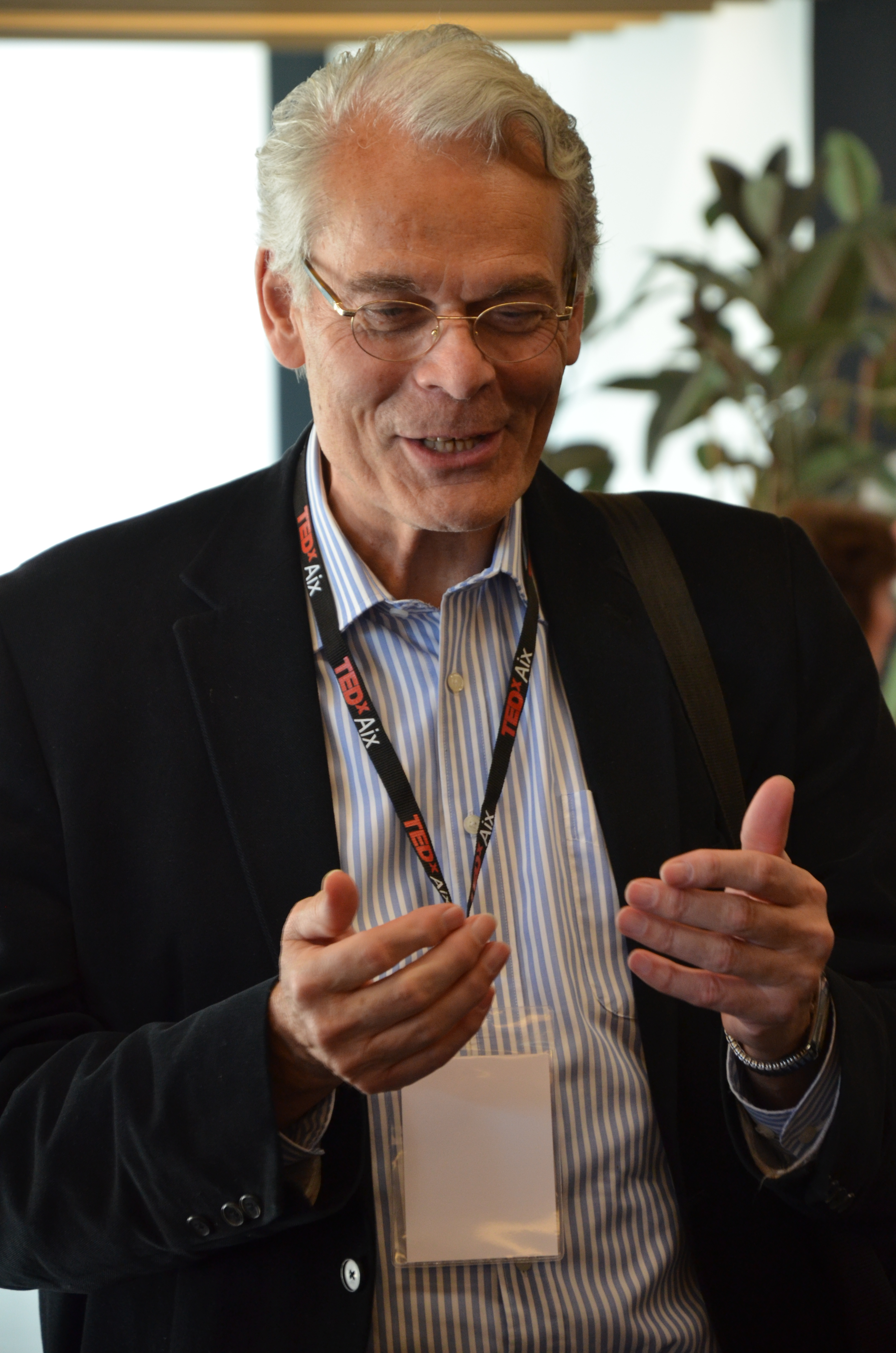 Michel Noir en mai 2014